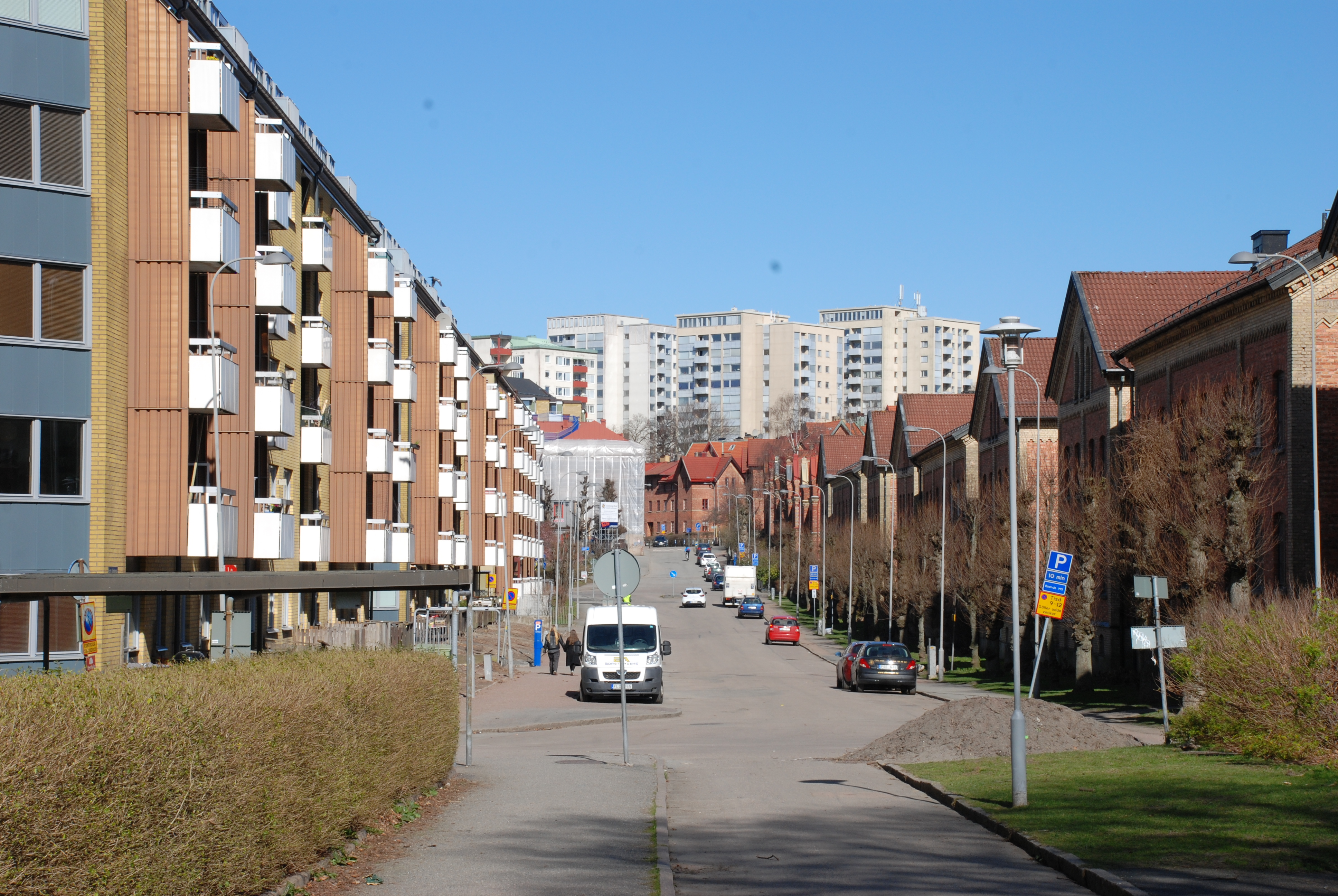 Carl Grimbergsgatan i stadsdelen Annedal i Göteborg i riktning norrut, sedd från Seminariegatan.